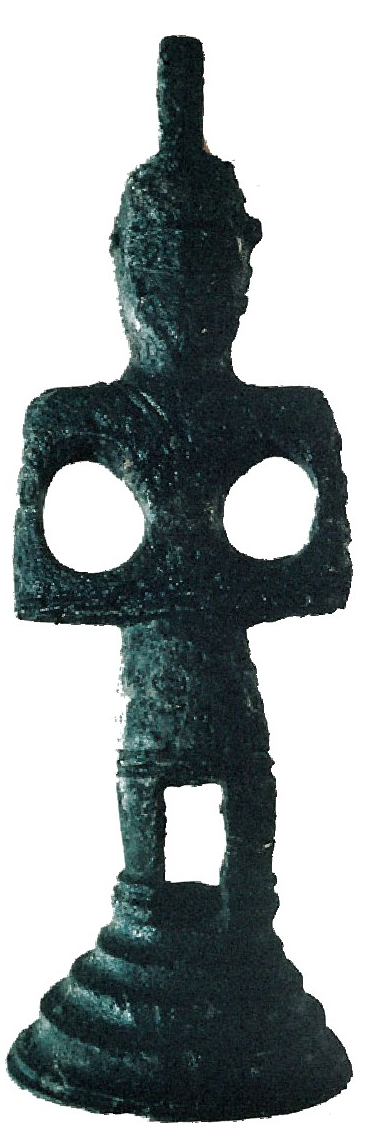 Brontzezko irudia, La Hoyako maila zeltiberiarrean aurkitua, Biasterin (Araba). Gasteizko Arkeologia Museoa.